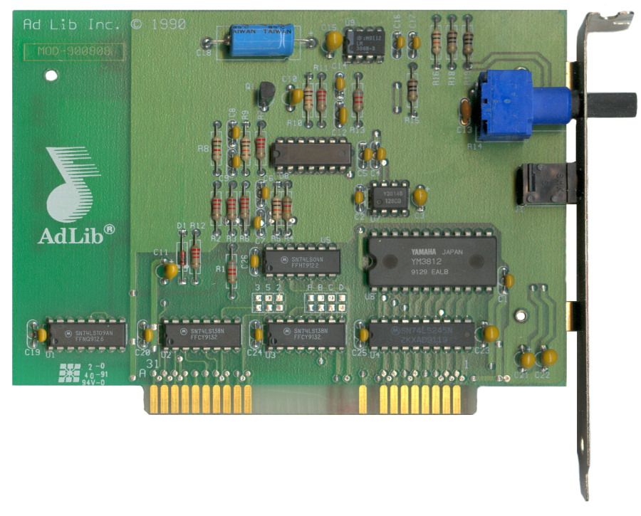 AdLib Music Synthesizer Card. AdLib sound card, version of 1990 with small headphone jack.